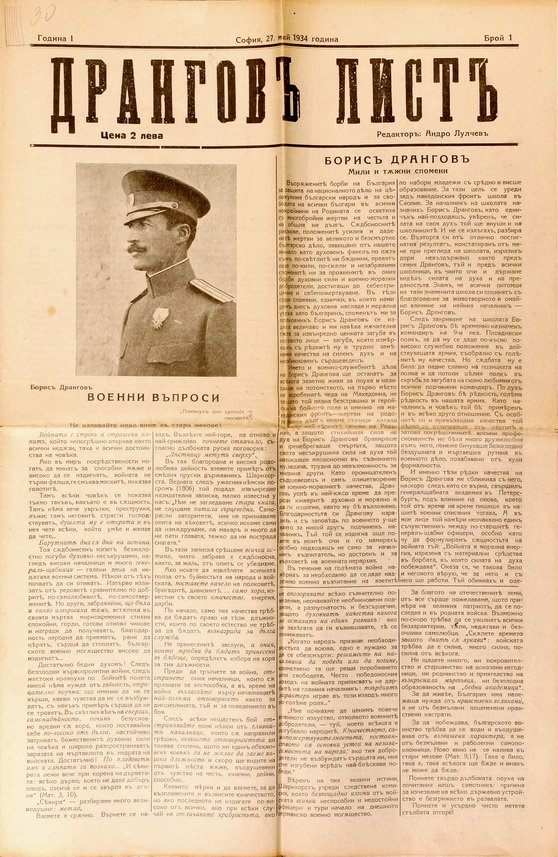 Вестник „Дрангов лист“